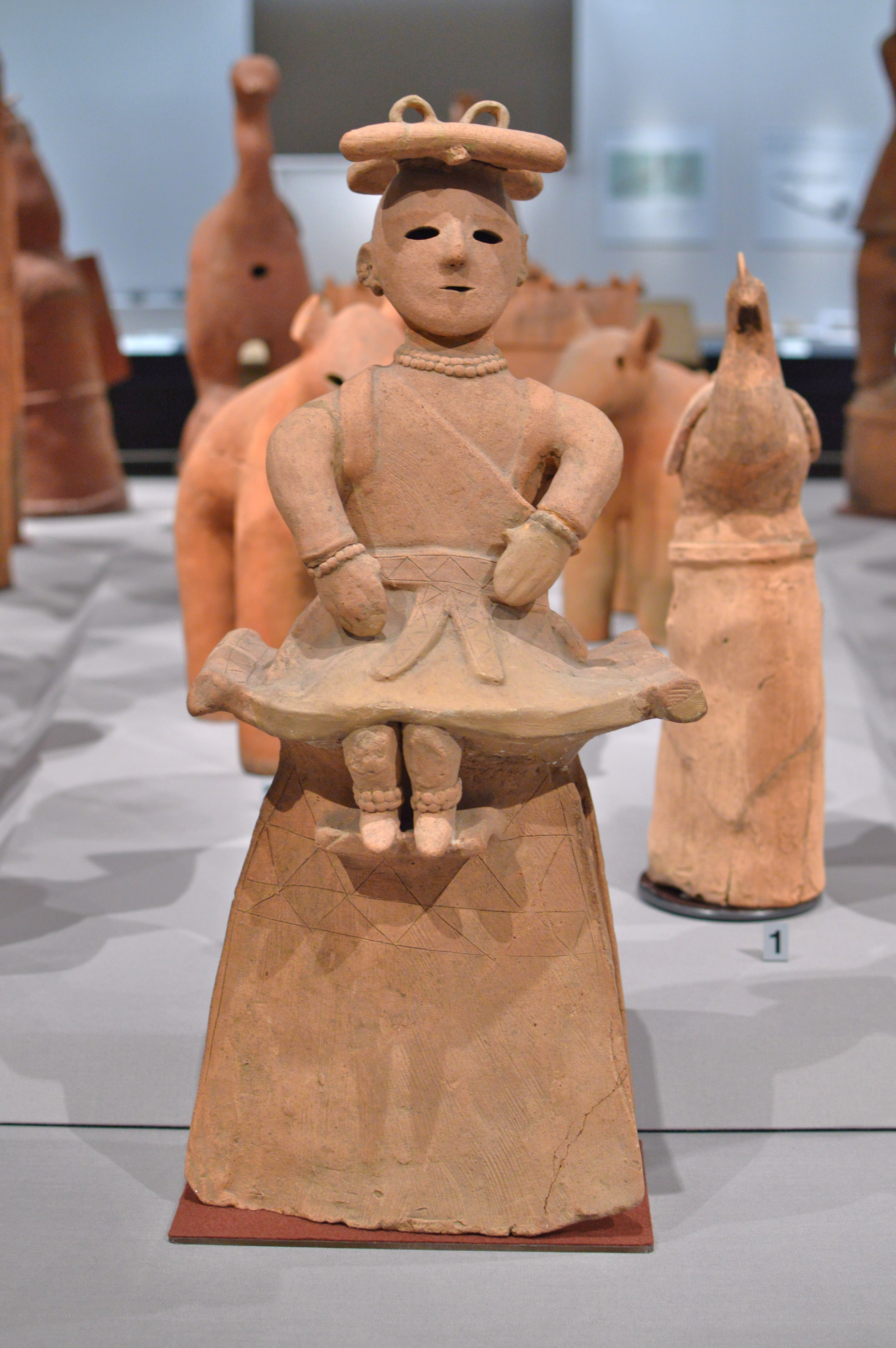 群馬県大泉町古海出土 埴輪 腰かける巫女